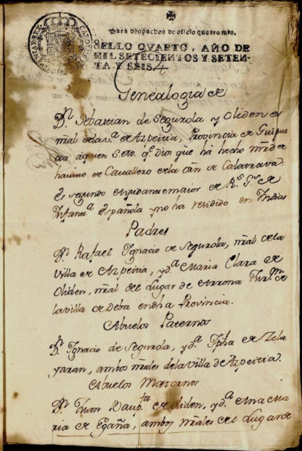 Fotografía de la genealogía de Sebastián de Segurola, según consta en su expediente de Caballero de la Orden de Calatrava.